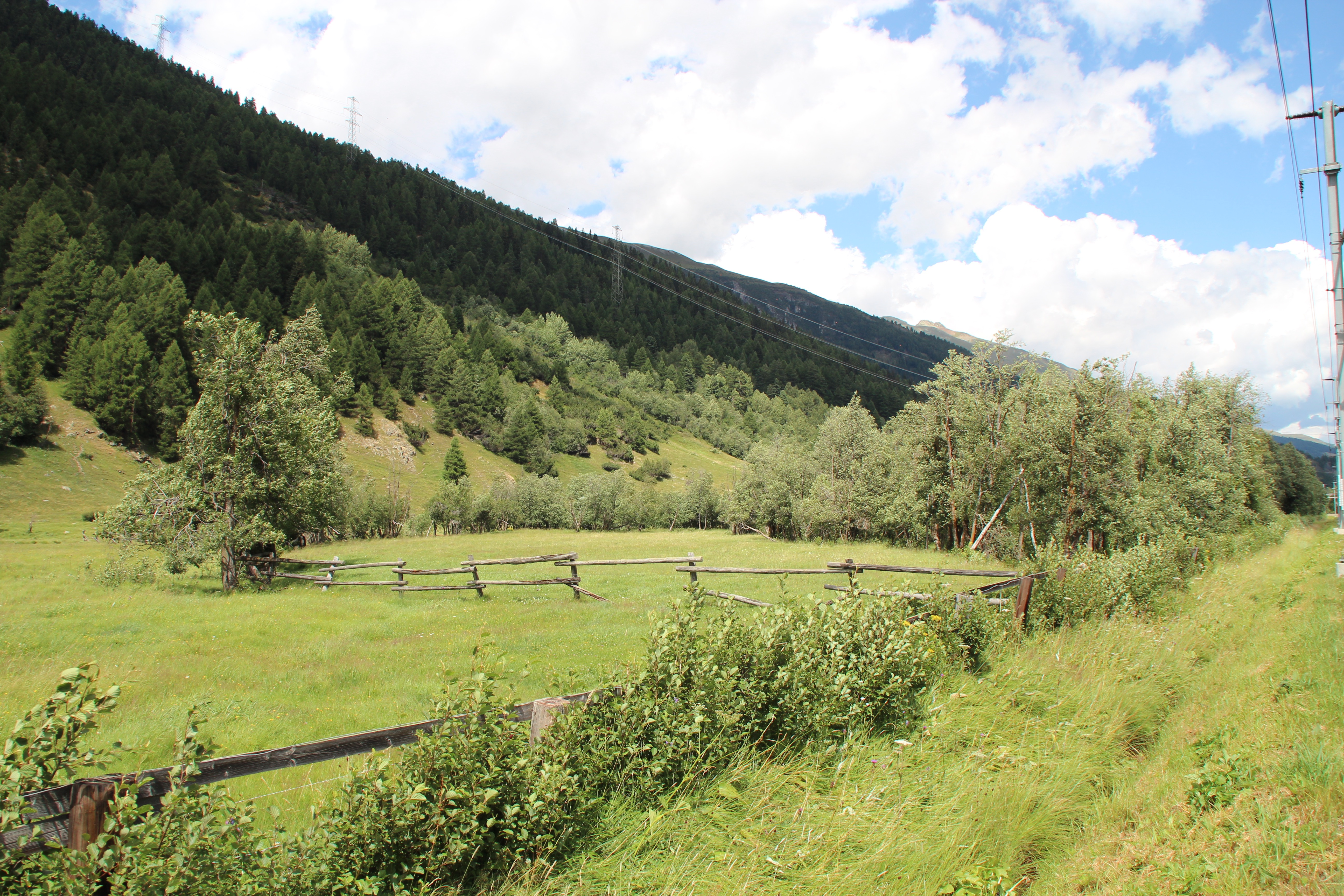 Beide:Funtauna Merla, zwischen Bever und La Punt